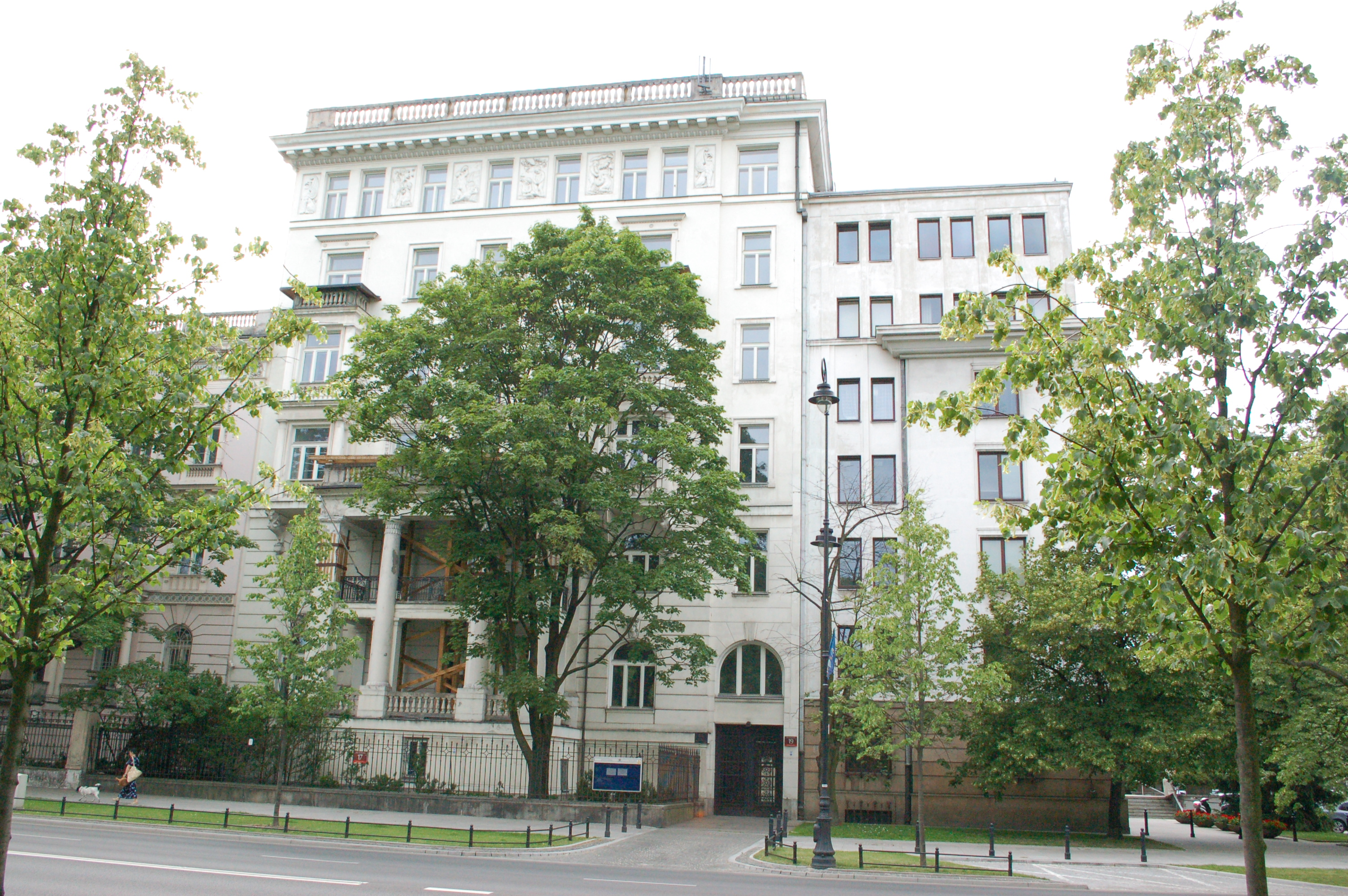 Warschau, Aleje Ujazdowskie